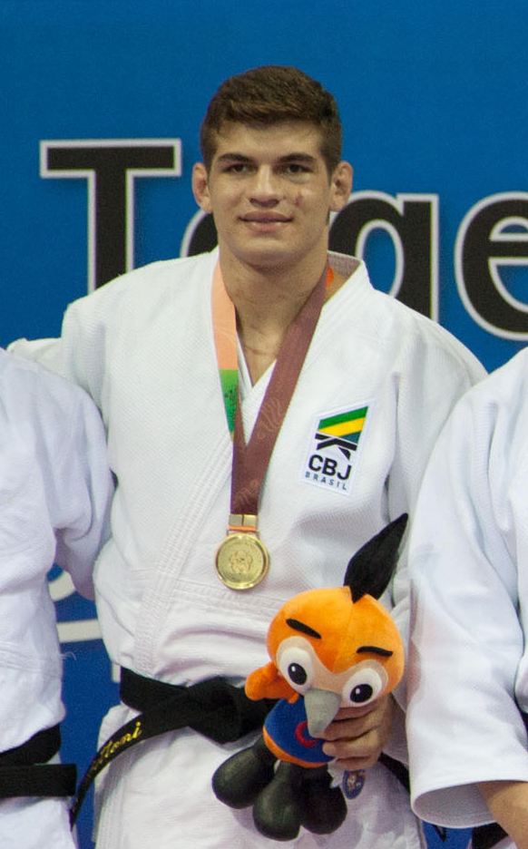 Eduardo Bettoni conquista mais uma medalha de ouro para o Brasil no judô individual. Foto: Sgt Johnson Barros (l-r: Rachid Assameur, Eduardo Bettoni, Tsogtgerel Khutag, Hyung-Ki Kim)